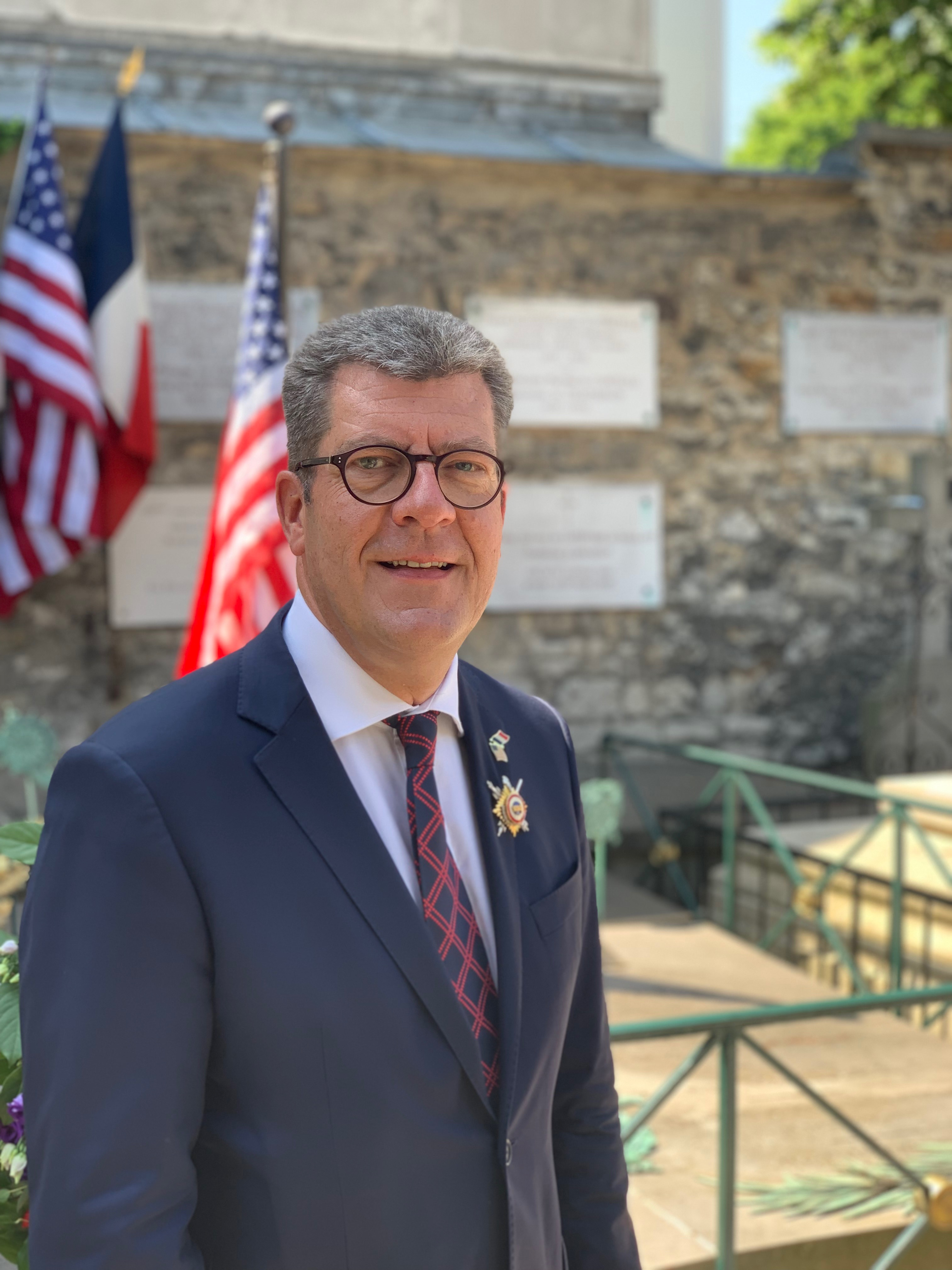 Antoine Lefevre lors d'une cérémonie de commémoration à la mémoire de La Fayette